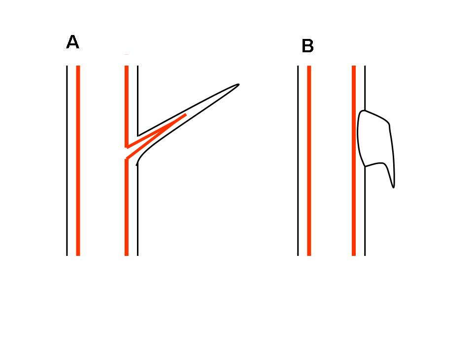 Diferencia anatómica entre una espina (A) y un aguijón (B). En la espina, los tejidos vascualres, esquematizados en rojo, continuan a los del tallo. El aguijón, en cambio, está formado por tejidos corticales, sin participación de los tejidos vasculares, por eso puede arrancarse con facilidad.